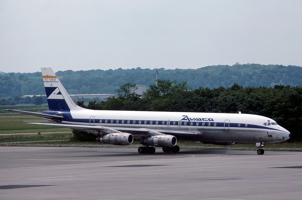 EC-ARB (cn 45618/138)